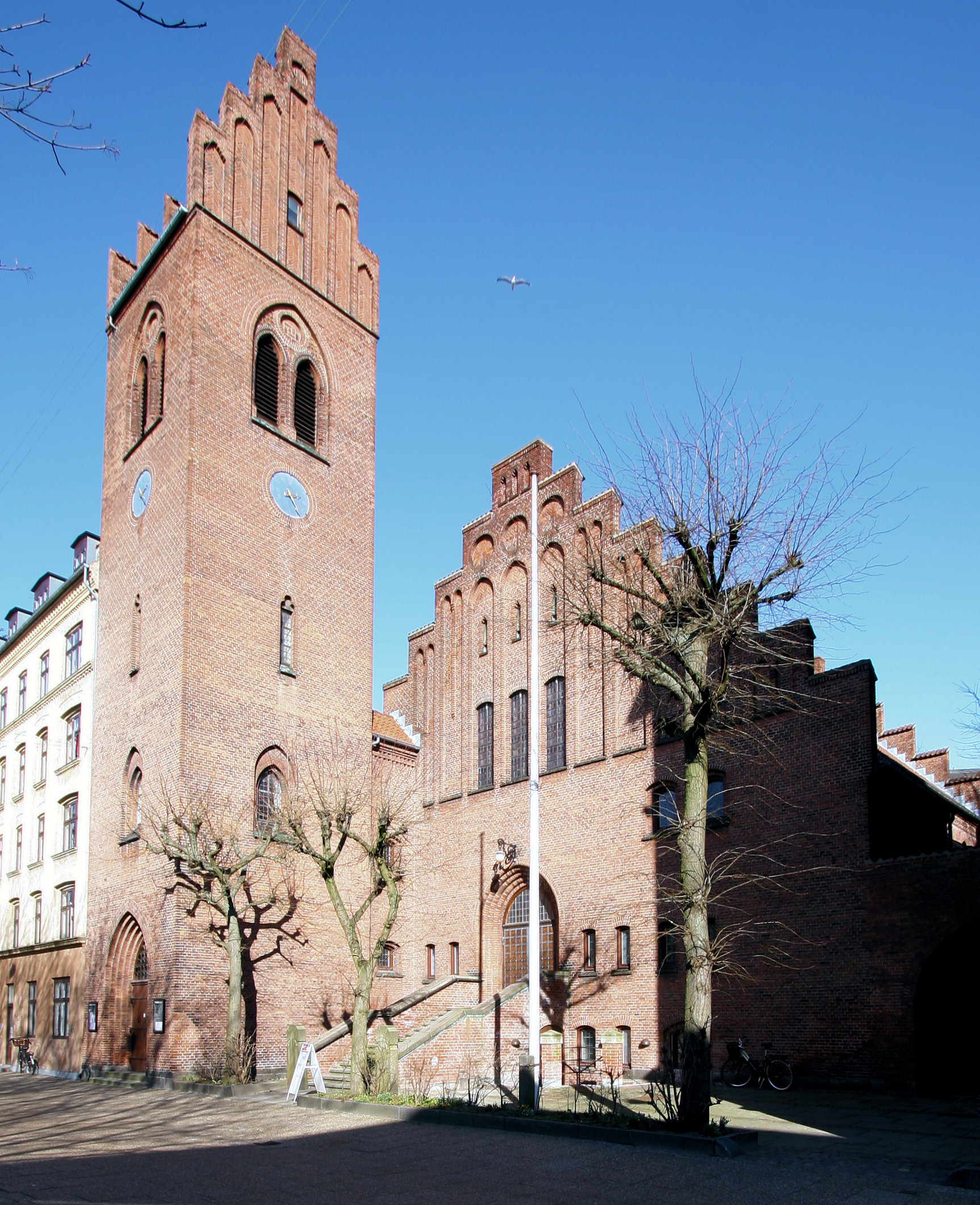 Gethsemane Kirke, Vesterbro, Copenhagen Denmark. Gethsemane Kirke